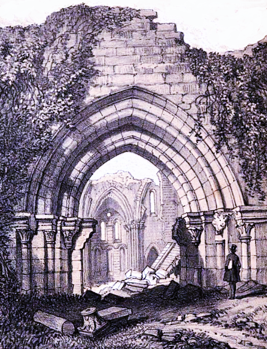 Abbaye de la Cour-Dieu, Ingrannes, Loiret (Gravure de 1827 retouchée)